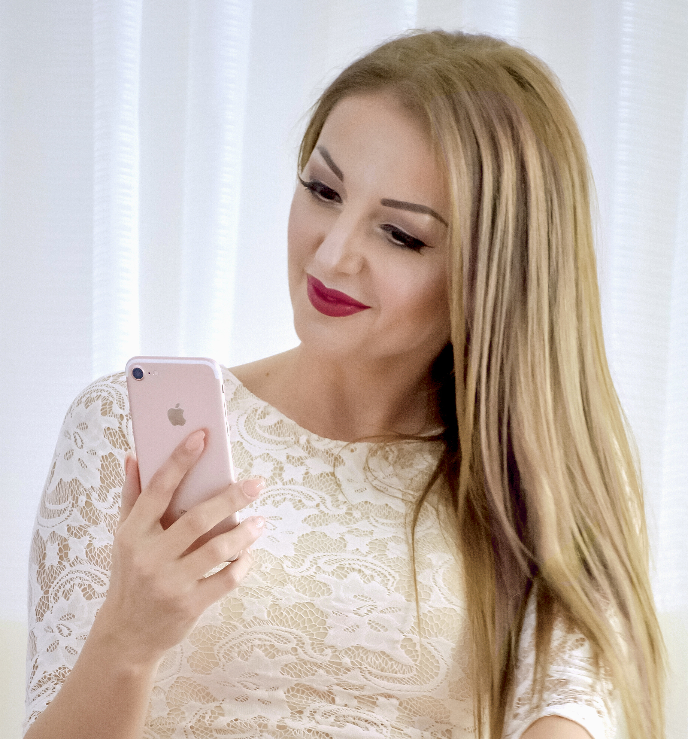 Nela Vidakovic